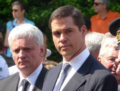 Le député-maire Thierry Lazaro et le prince Louis de Bourbon lors des célébrations officielles commémorant le 800e anniversaire de la bataille de Bouvines.